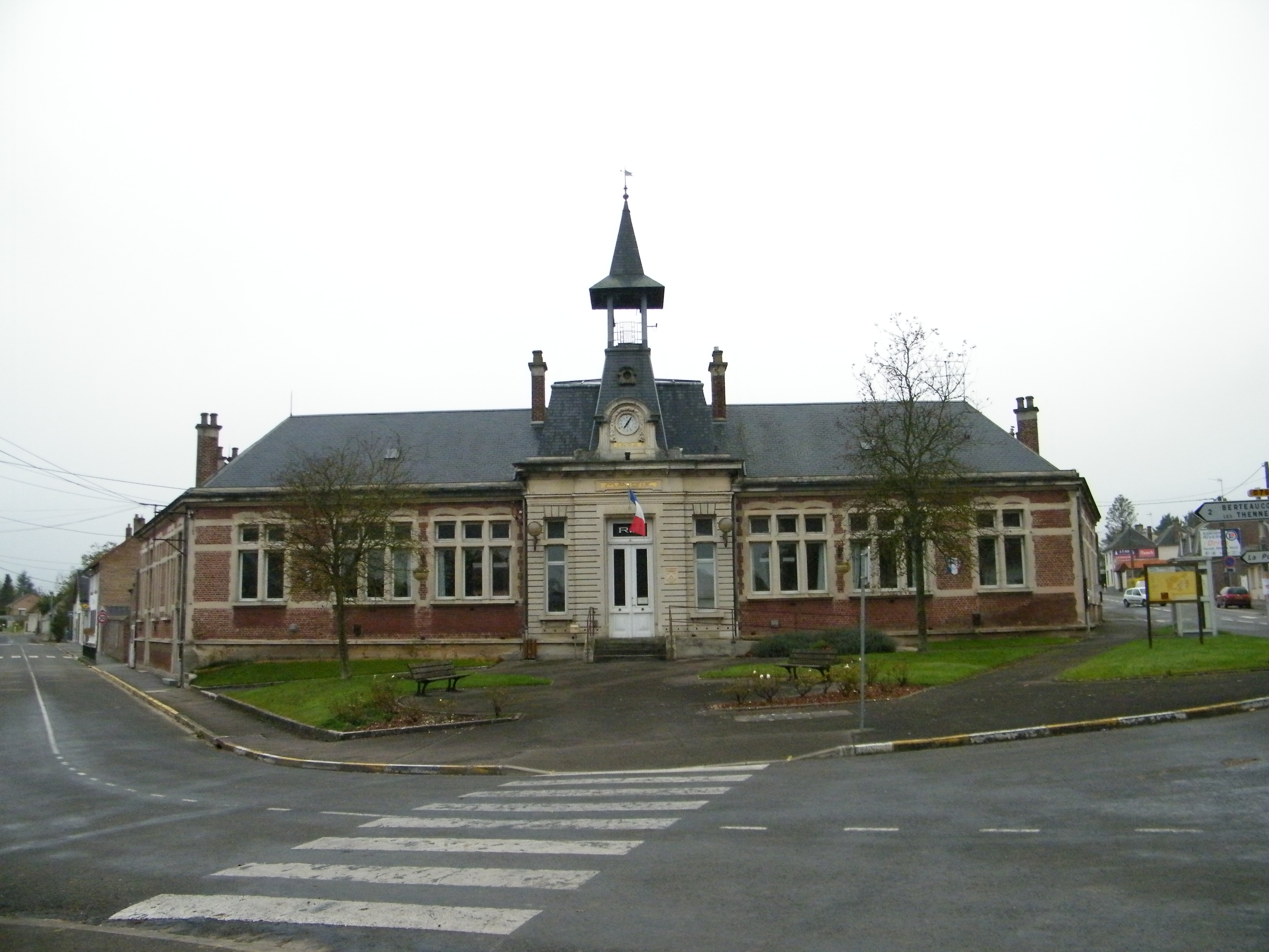 Hôtel de ville.